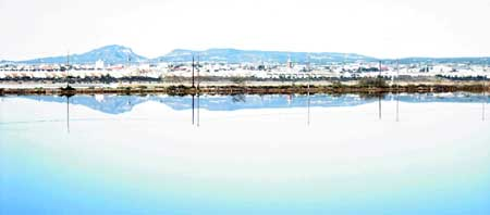 Una sierra que limita la depresión litoral es conocida como "La bella durmiente" a causa de la forma de mujer acostada que parece representar. En esta foto se ve la sierra desde una charca de las Salinas.